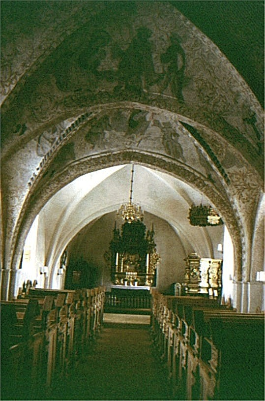 Undløse Kirke, interior